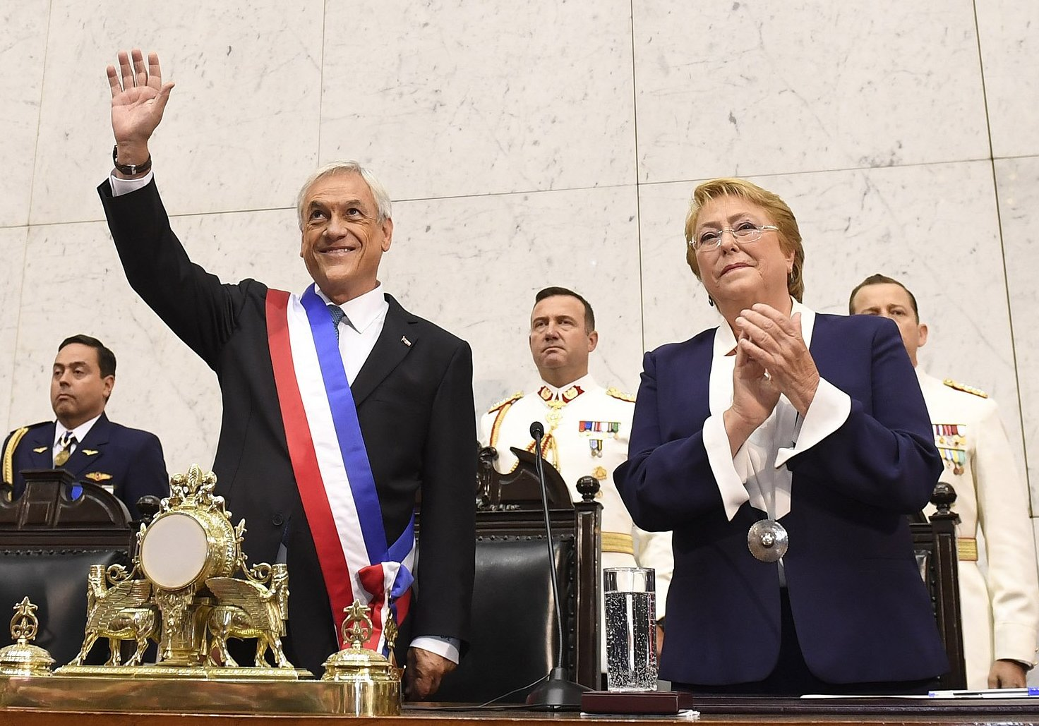 S.E. El Presidente la República de Chile Sebastián Piñera Echenique asume su segunda presidencia mientras que Michelle Bachelet concluye la suya.